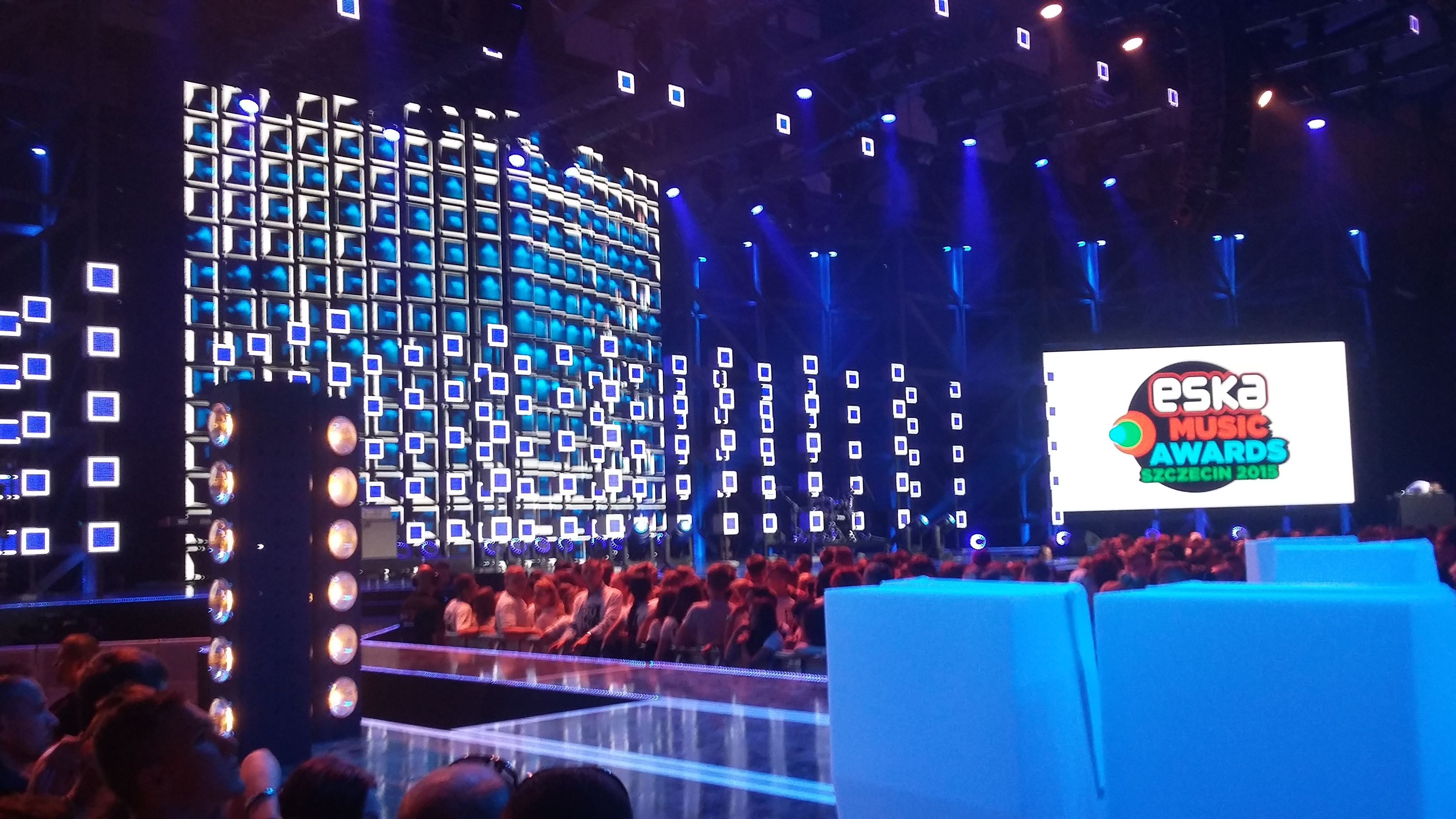 Obraz przedstawia scenę gali 2015 Eska Music Awards